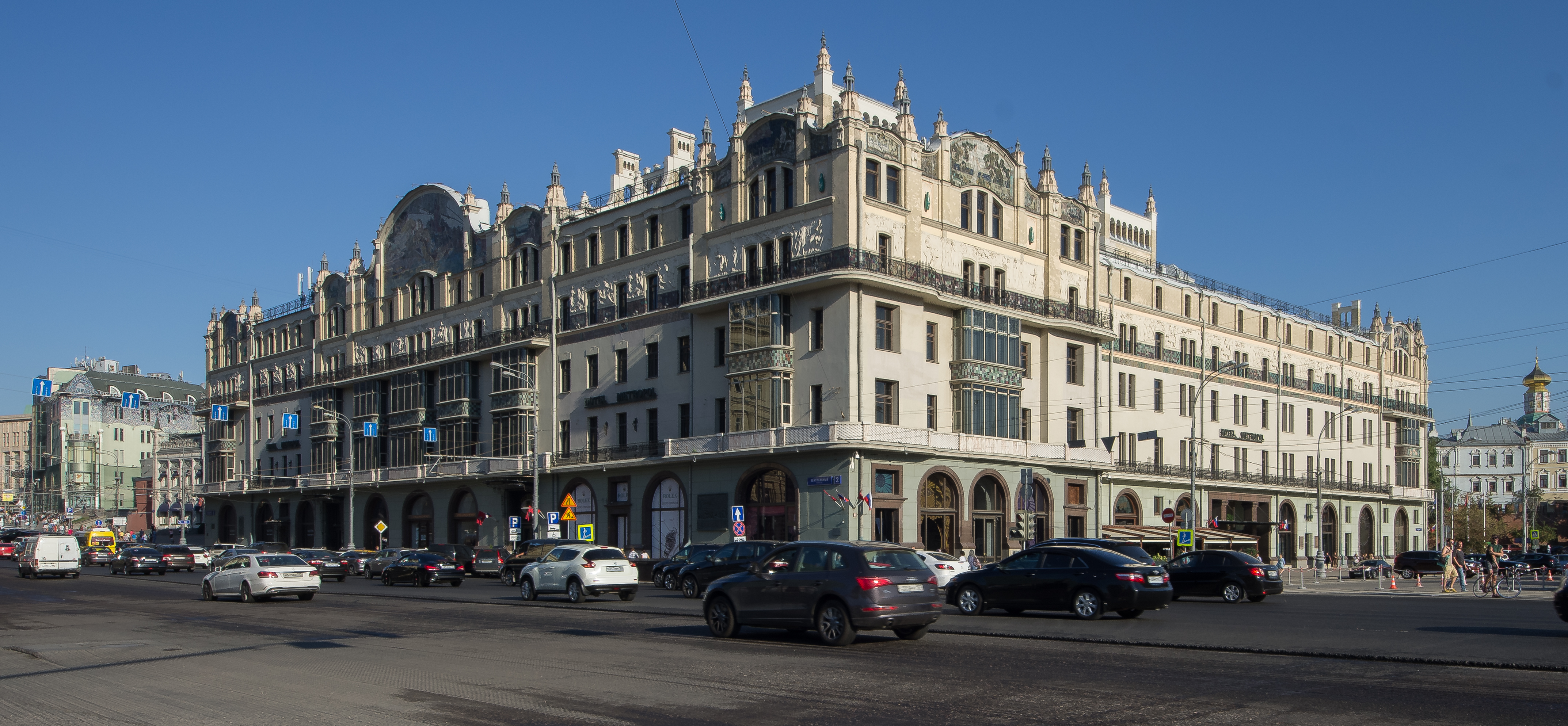 Здание гостиницы Метрополь: Театральный пр., дом 2, Тверской, Центральный округ, Москва